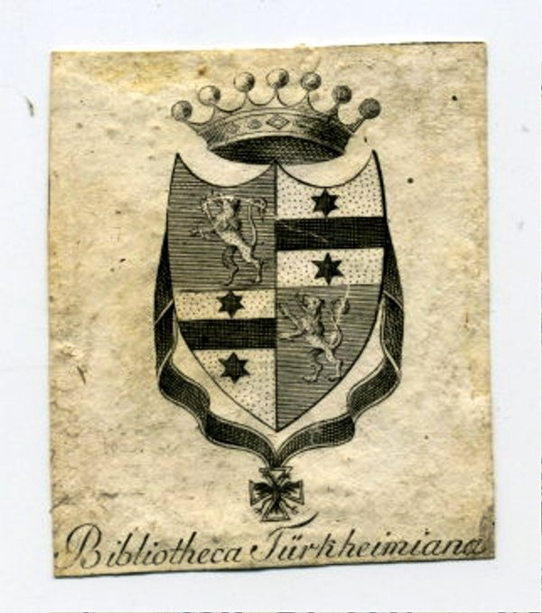 Exlibris der Bibliotheca Türkheimiana (Freiherren von Türckheim in Altdorf bei Ettenheim)